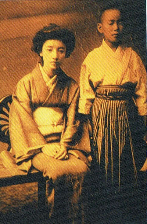 大正3年頃、福岡時代の柳原白蓮（伊藤燁子）と養子の伊藤八郎（11歳）